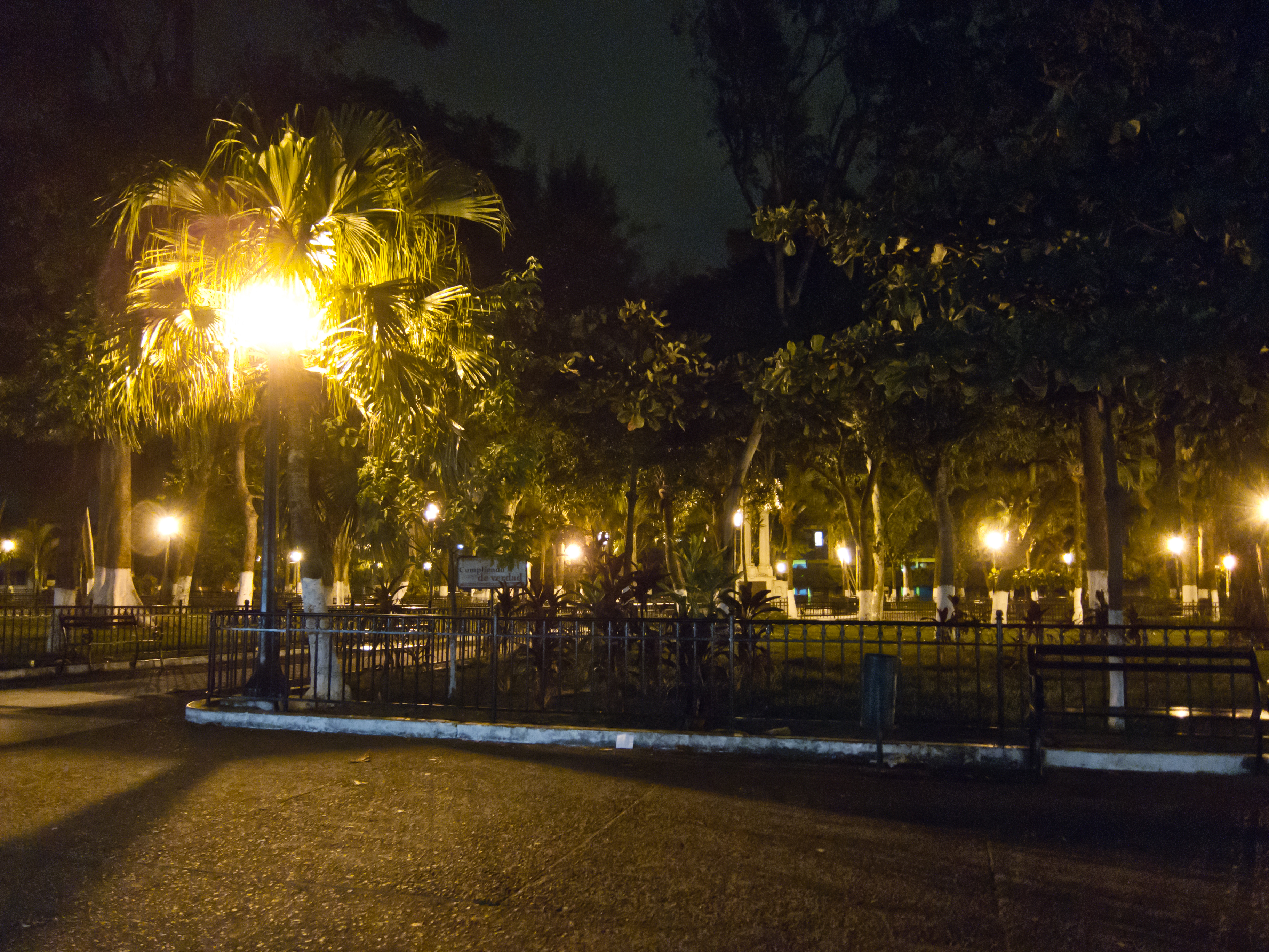 Parque San Martin en Santa Tecla, La Libertad, El Salvador, en la noche